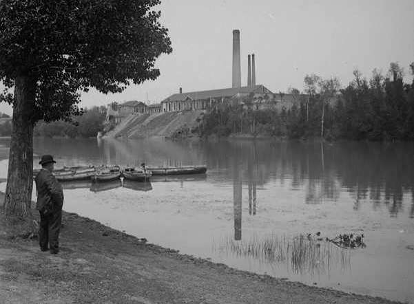 Fábrica de carburadores IRZ (Isidro Rodríguez Zarracina) desde las aceñas (Fernández del Hoyo) - Valladolid - Libro Valladolid hace 100 años - Postal B/N